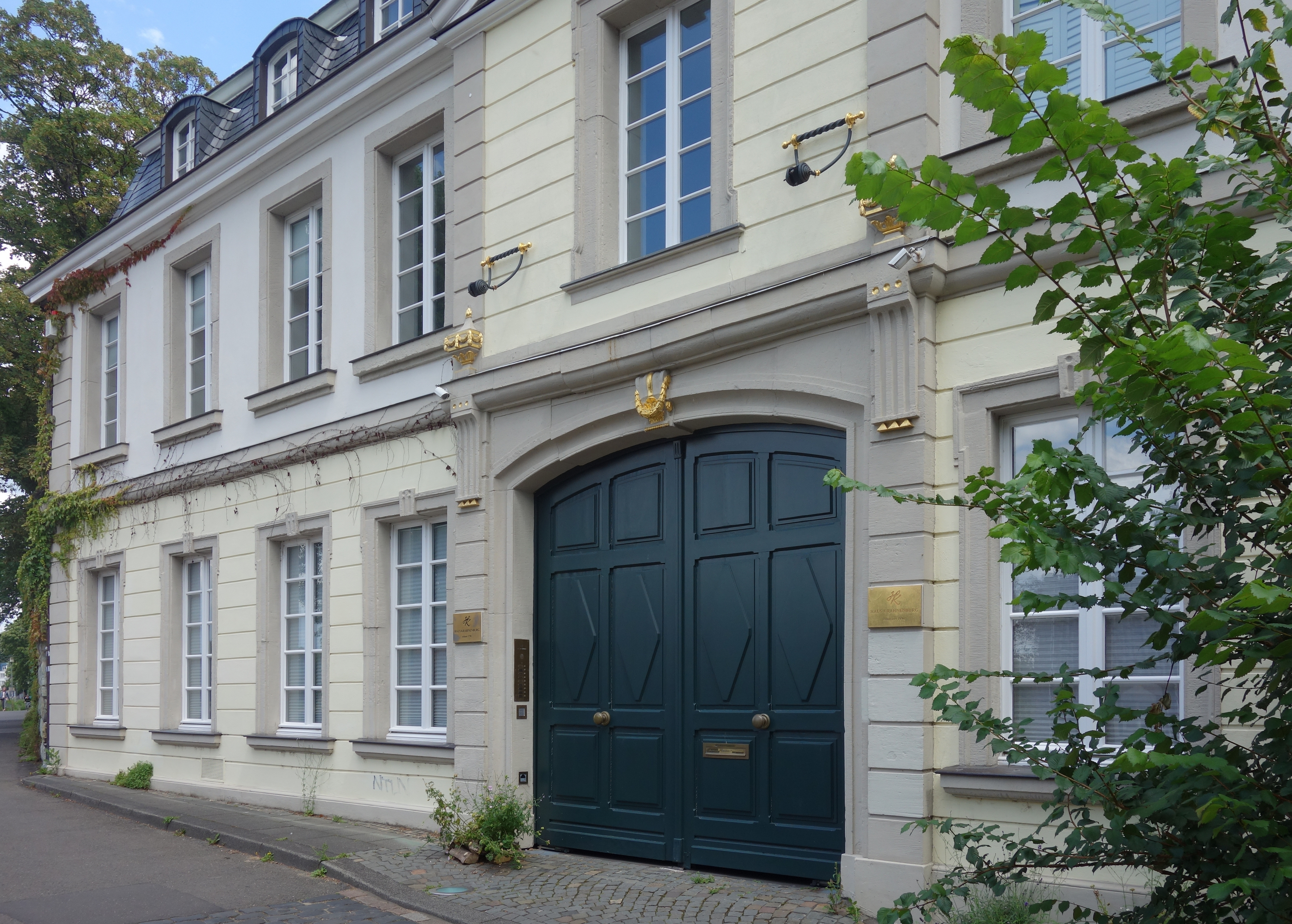 Haus Krahnenburg in Köln-Mülheim